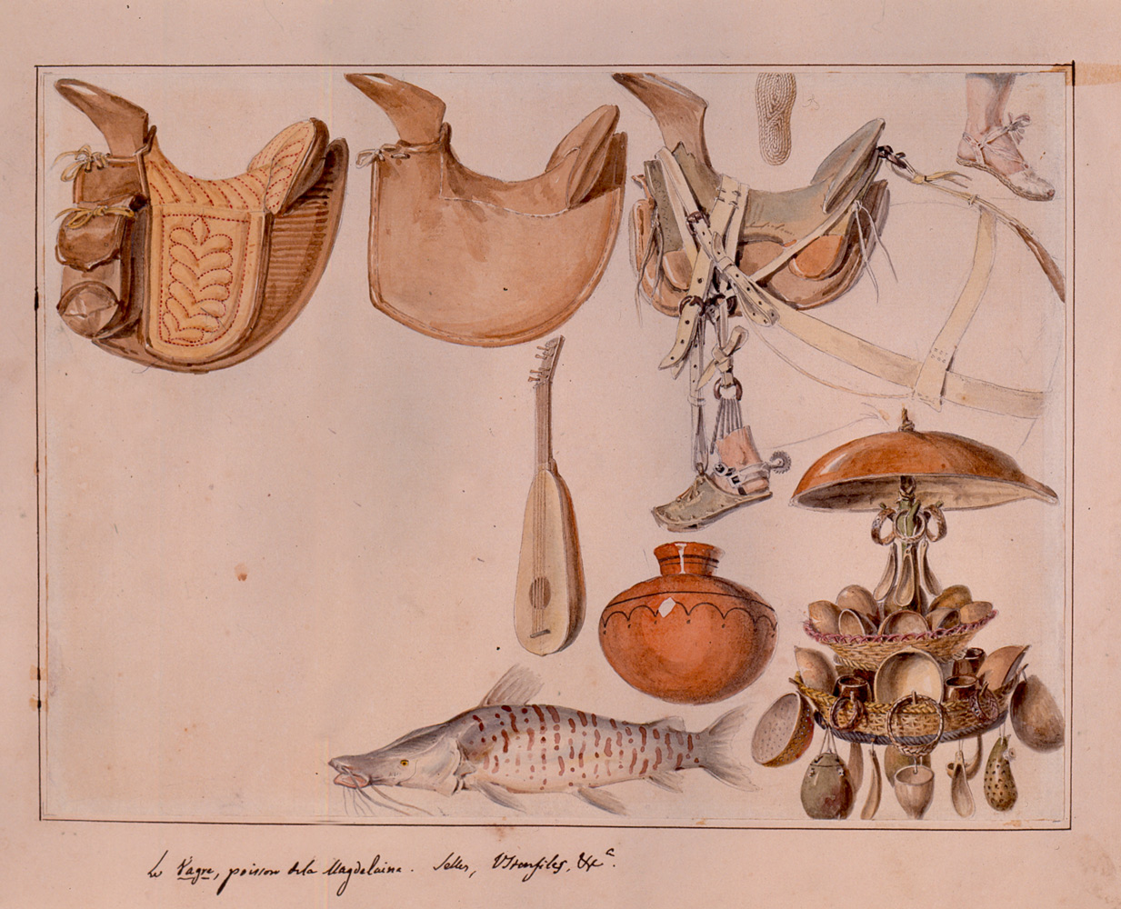 TÍTULO Le Vagre, poisson de la Magdelaine. Selles, ustensiles (El bagre, pescado del Magdalena. Sillas, utensilios) ARTISTA François Désiré Roulin NÚMERO DE REGISTRO AP4085 FECHA DE INGRESO A LA COLECCIÓN Viernes, Noviembre 21, 2003 TÉCNICA Acuarela sobre papel DENOMINACIÓN Acuarela DIMENSIONES 20,3 x 26,7 cm